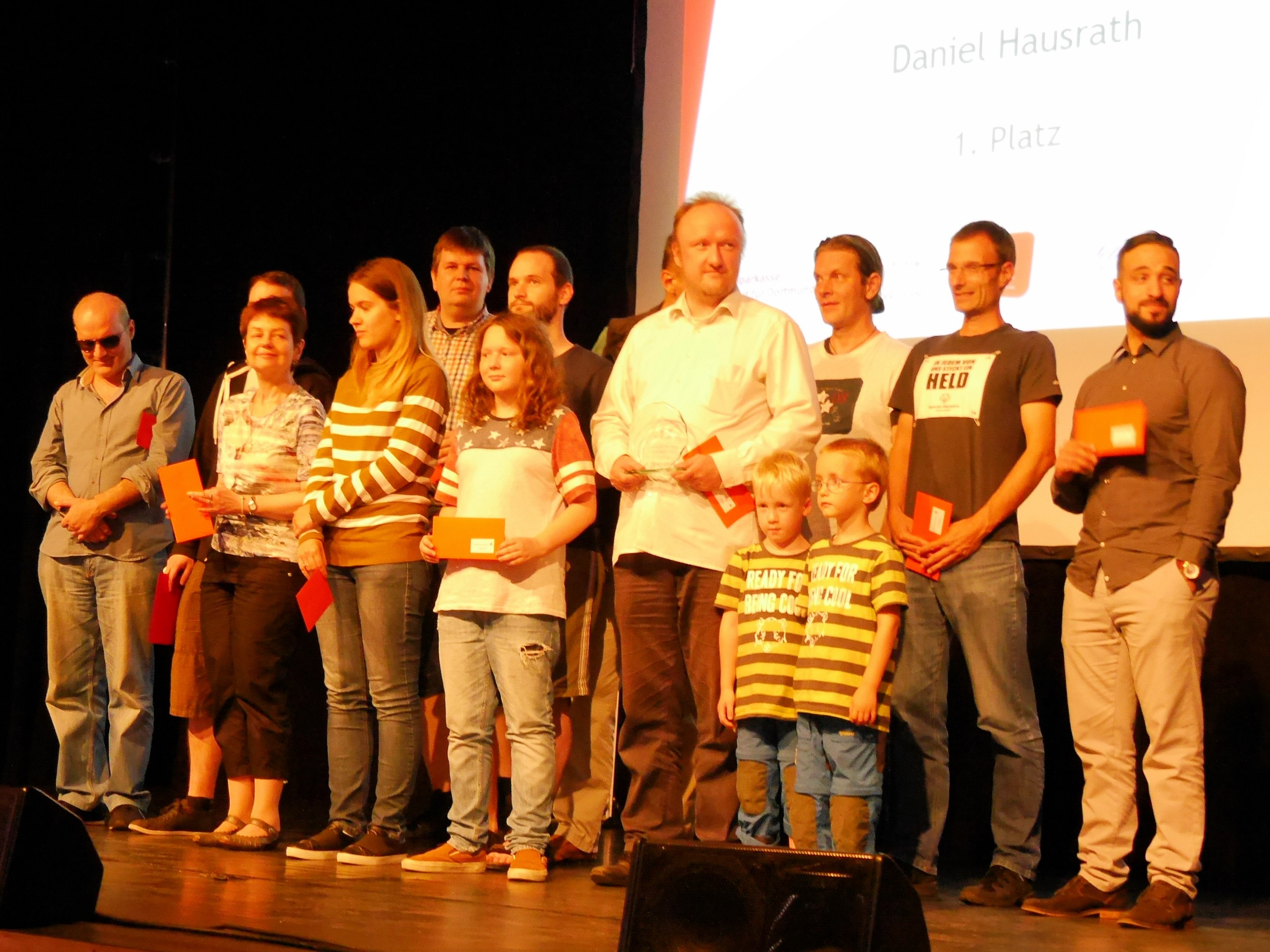 Siegerehrung des Open A 2017, Fritz-Henßler-Haus in Dortmund. In der Mitte Daniel Hausrath (mit zwei seiner Kinder), der Sieger des OPEN A.